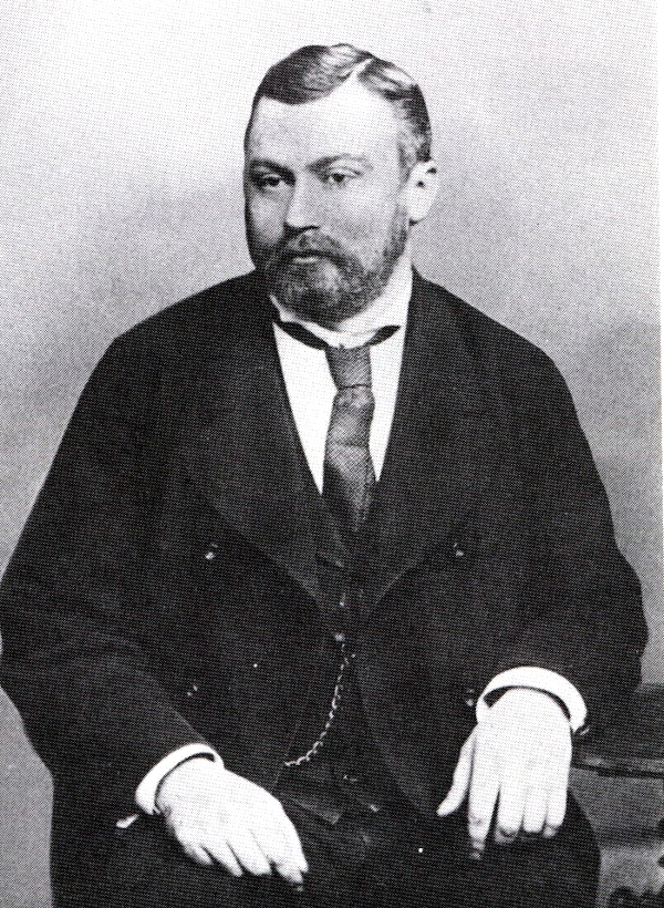 Erkel Elek magyar zeneszerző, karmester.